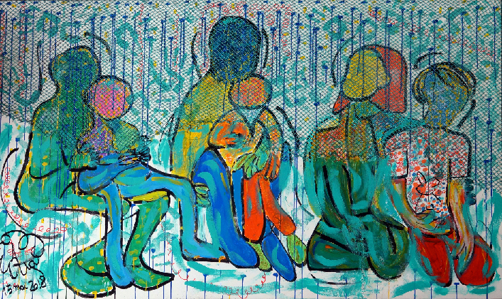 toile, 114 x 195, technique mixte, avril 2018